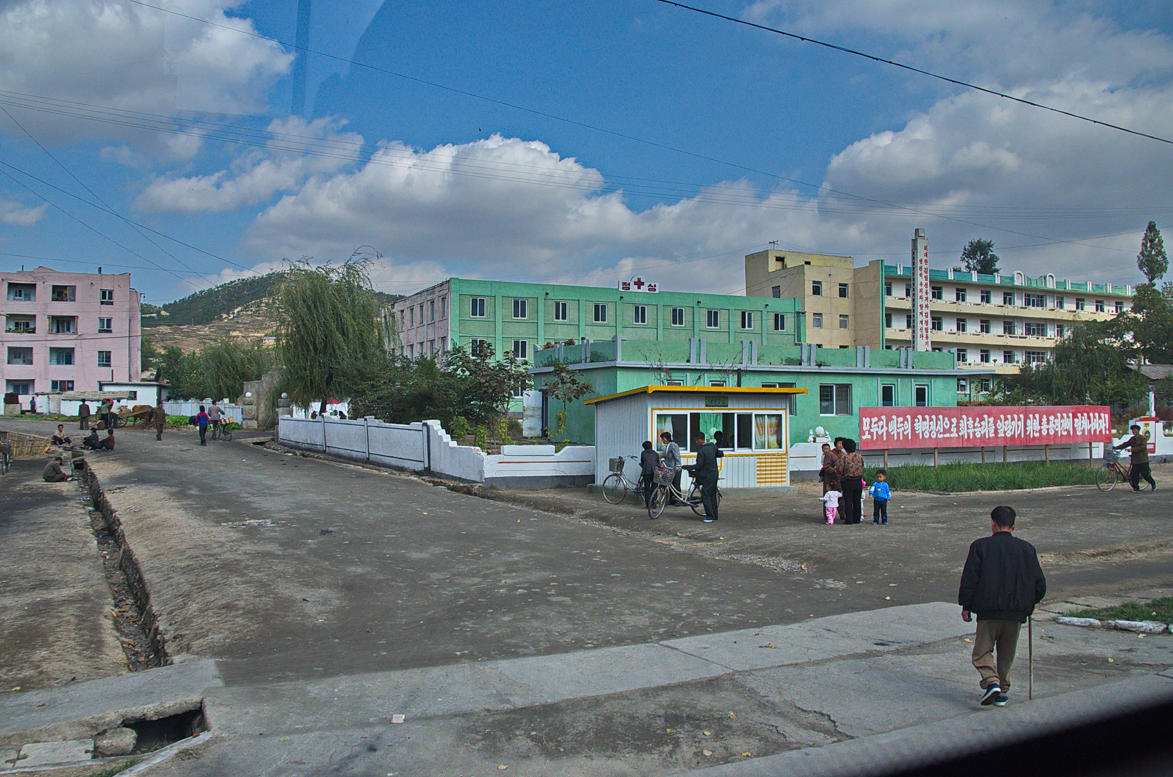 Nordkorea 2015 - von Nampo nach Käsong